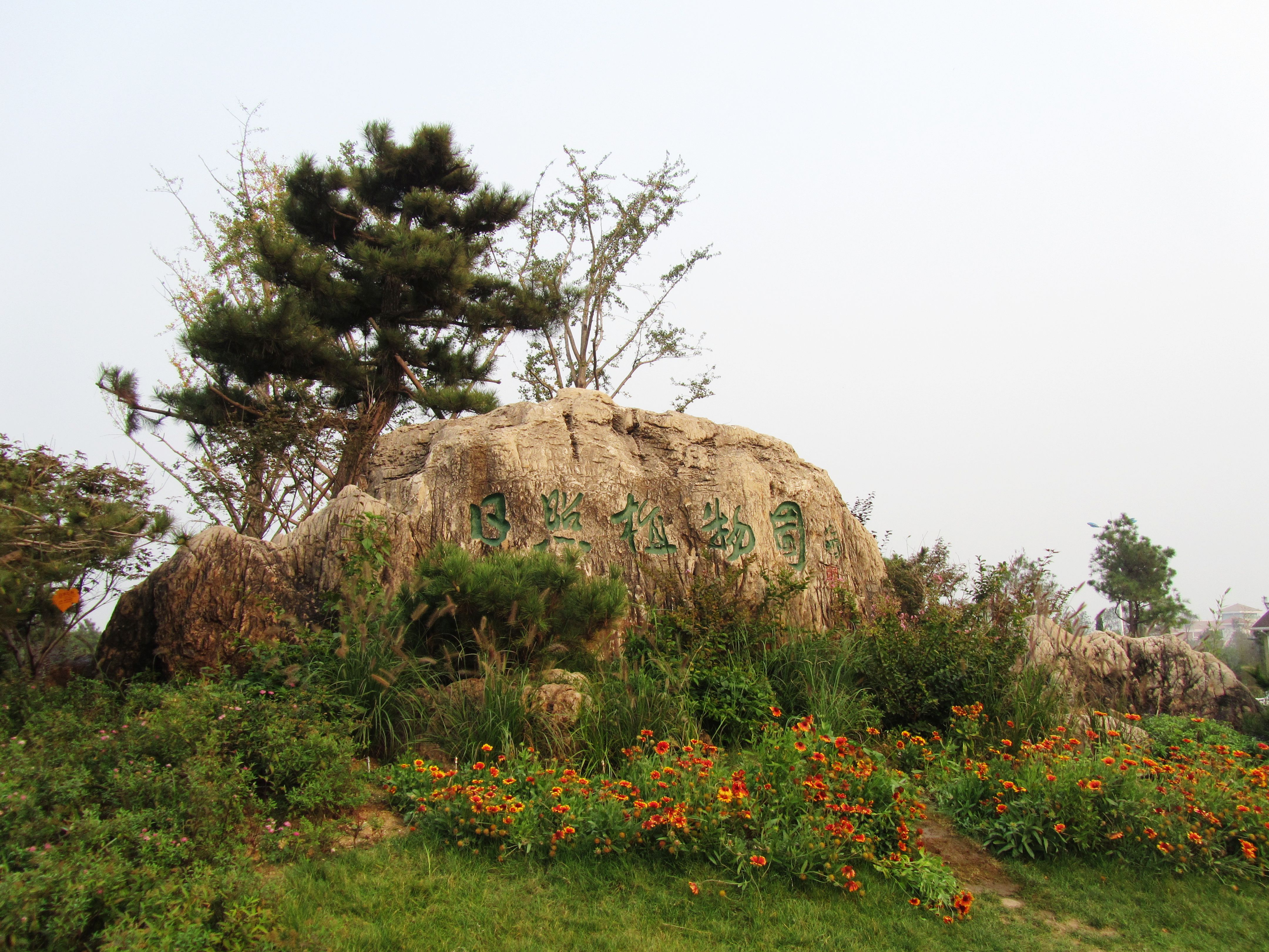 日照植物园西门假山。